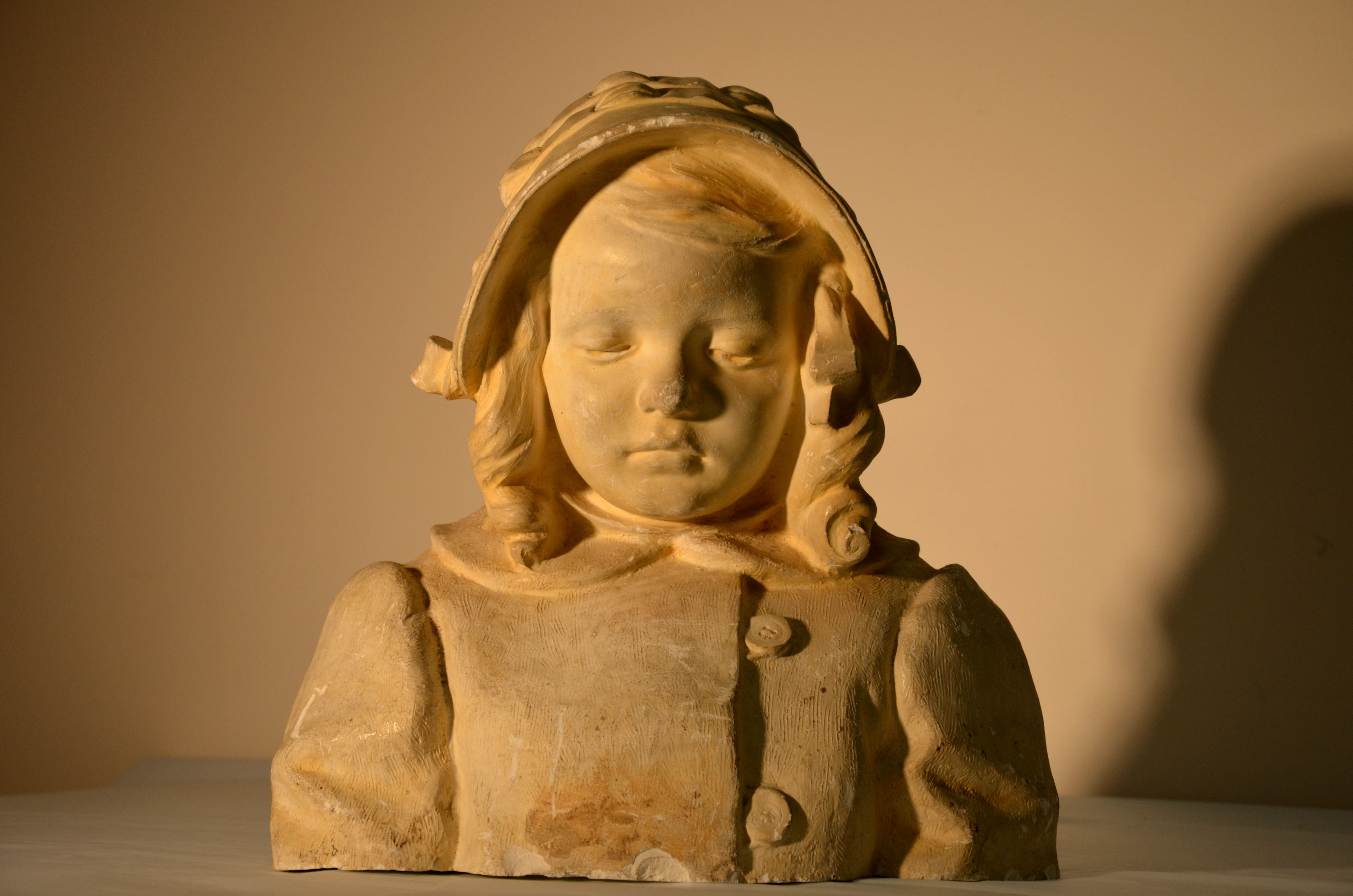 Buste d'Aurore Agard réalisé par son père, exposé au Salon des Artistes Français en 1911